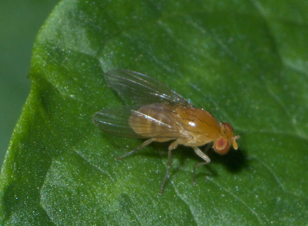 Neogriphoneura sordida, Order: Flies, ID Confidence: 87